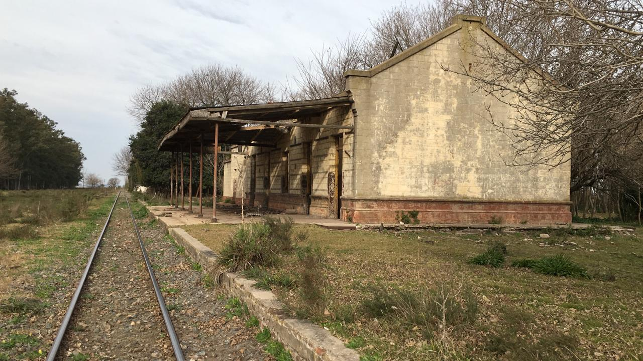 Estación de trenes abandonada